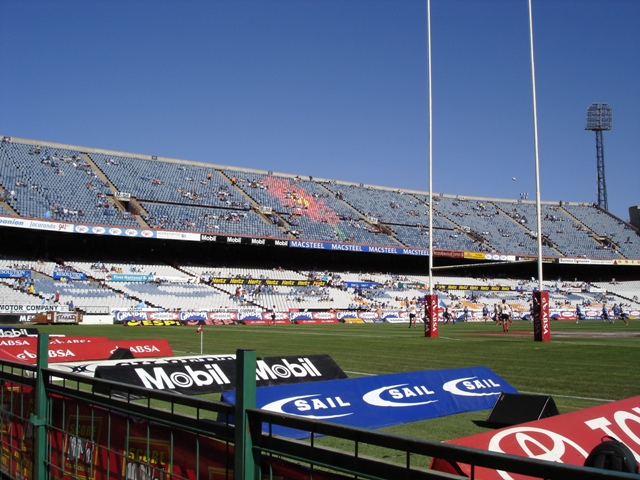 Die Loftus-stadion in Pretoria, Suid-Afrika